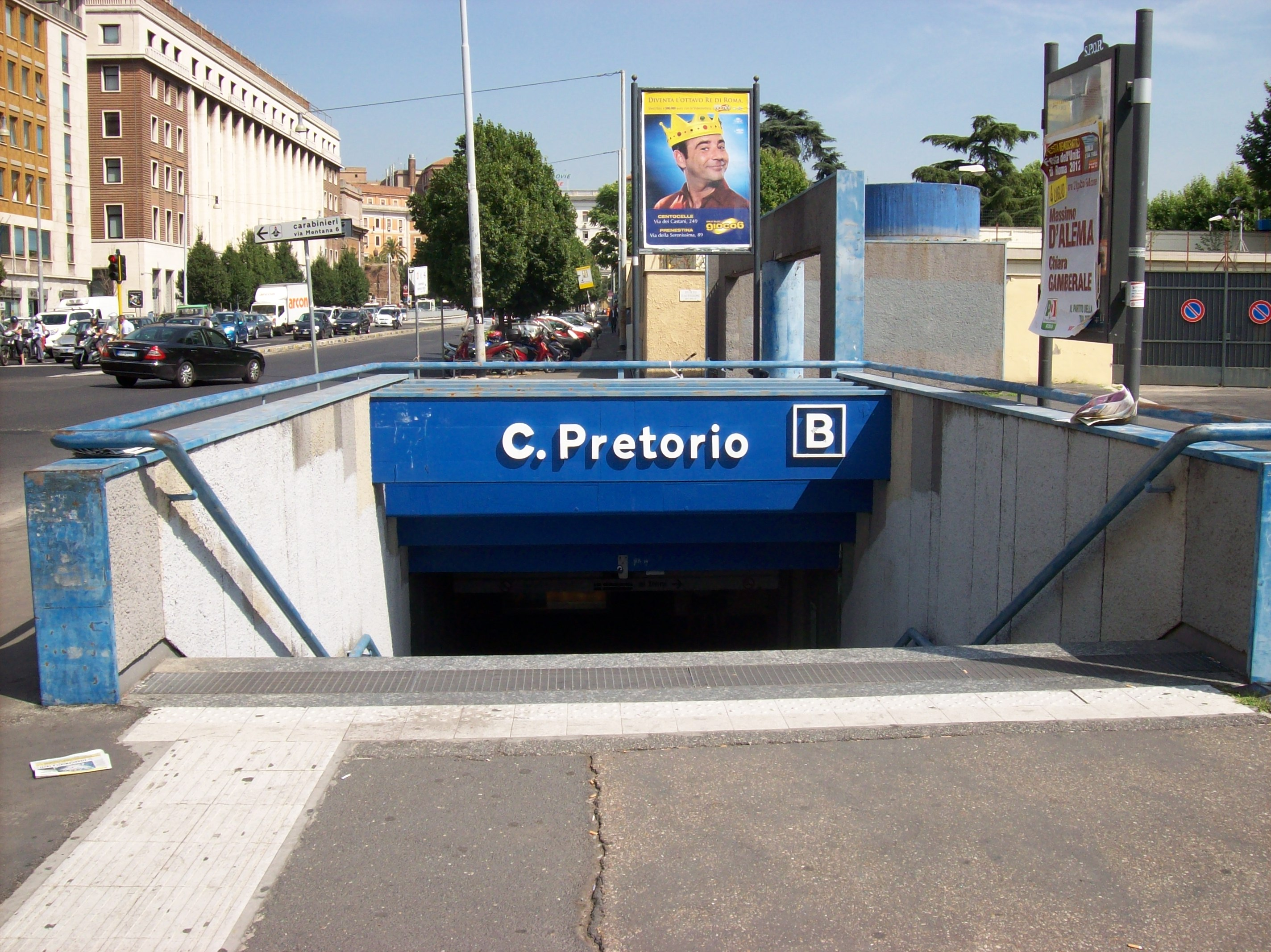 Rome Metro B station Castro Pretorio